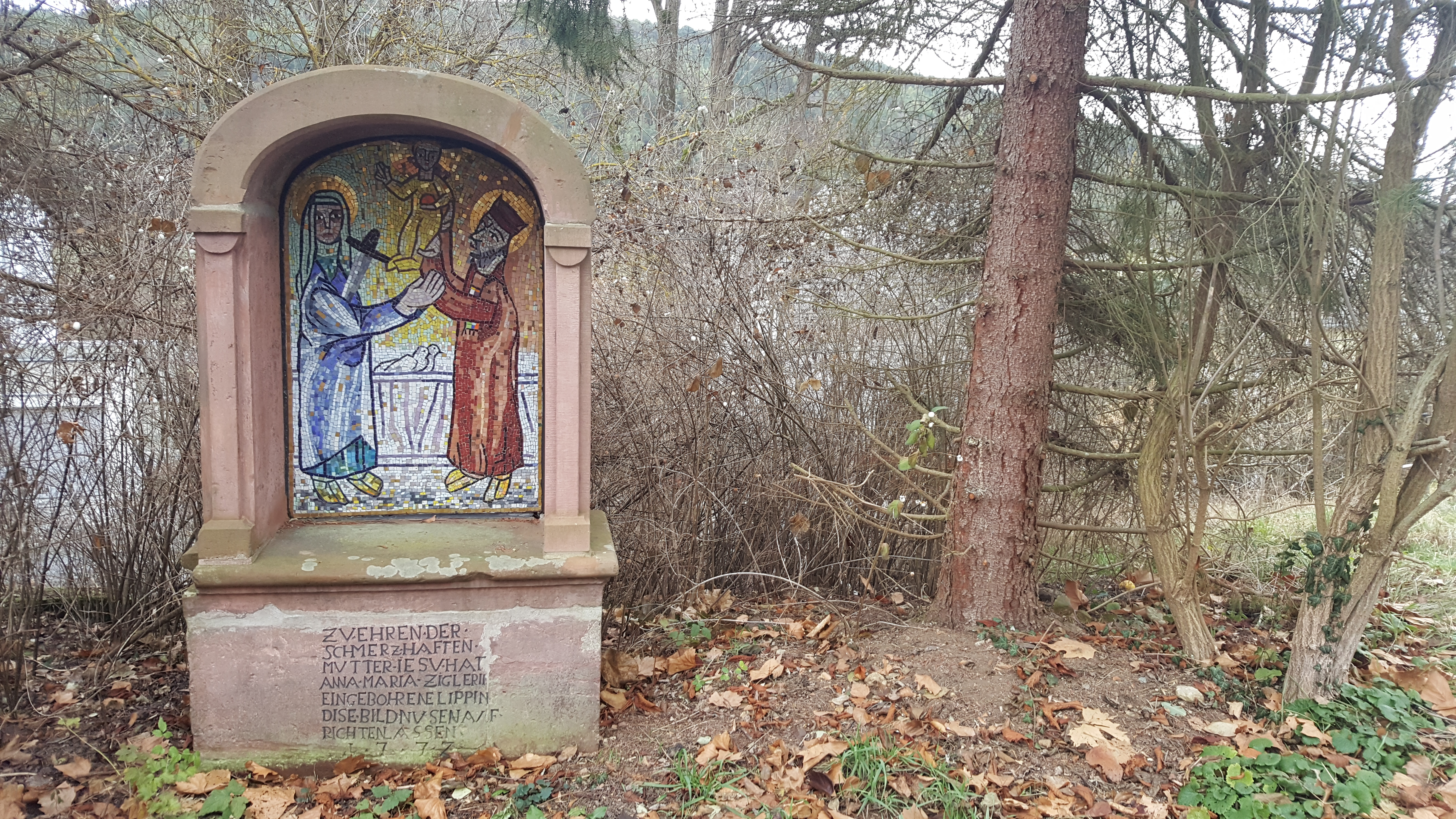 Der Kreuzweg in Tauberbischofsheim zur Stammbergkapelle. Es handelt sich um einen Kreuzweg mit sieben Stationen für die "Sieben Schmerzen Marias". Auf jedem Mosaikbild ist ein Schwert zu sehen, das jedes mal in das Herz der Mutter Jesu sticht. Es ist ein Vergleich mit dem Kreuz und somit ein Symbol für die Schmerzen Marias. 1. Station: Die Weissagung des Simeon